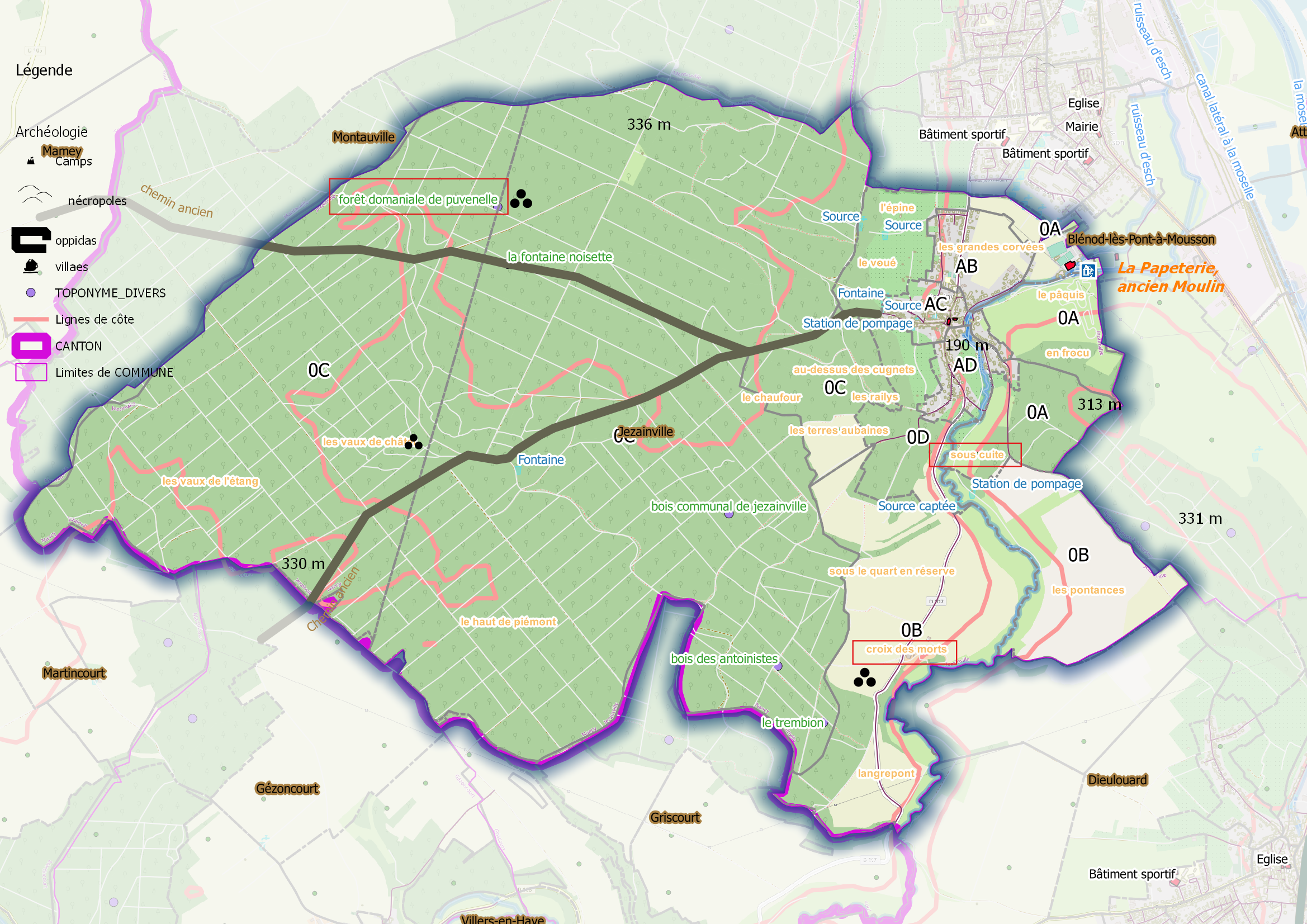 Jezainville (ban communal) OSM et Qgis, mentions additionnelles